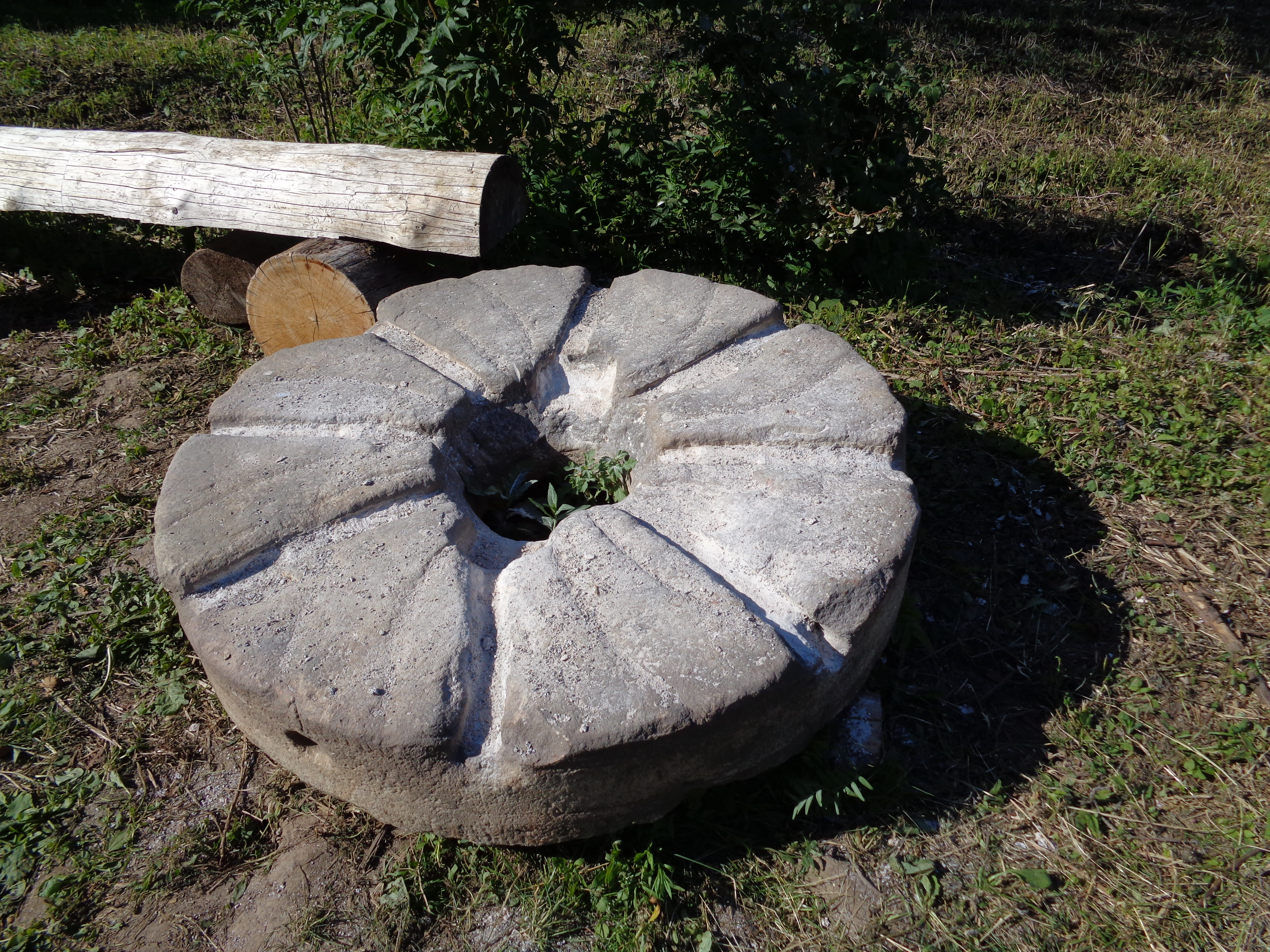 Музей-заповедник Л.Н. Толстого «Ясная поляна»: Музей-заповедник расположен в основном в пойме р. Воронки в 15 км от г, Тулы. В 3,5 км находится ж.-д. станция «Ясная Поляна» Московской ж.д. В 1 км от усадьбы проходит шоссе Москва-Симферополь, На севере, северо-востоке и северо-западе ООПТ граничит с Тульскими засеками (земли Гослесфонда), на юге и юго-востоке — с сельхозугодьями, на востоке — с территорией Яснополянской больницы,д. Ясная Поляна,Щёкинский район, Тульская область This image is related to the protected area of Russia number 7100085